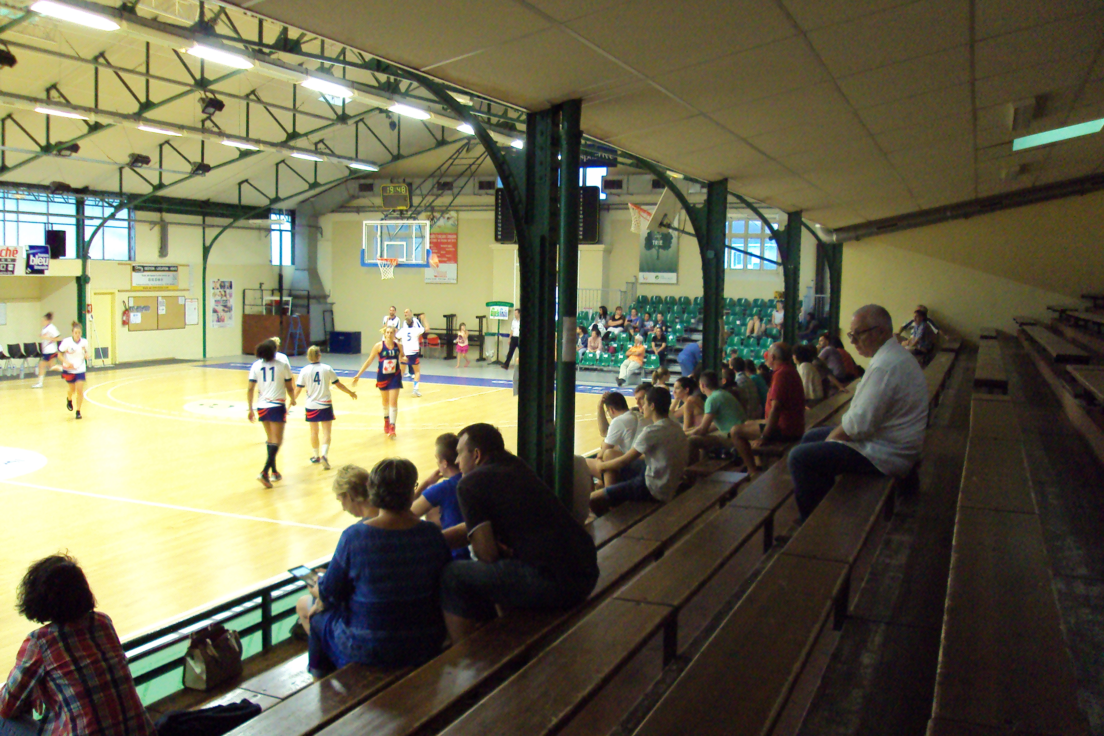 les gradins en bois